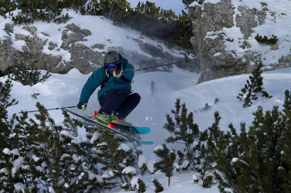 Skiguides am freeriding